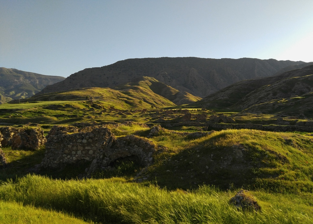 شهر تاریخی دره شهر/ سیمره